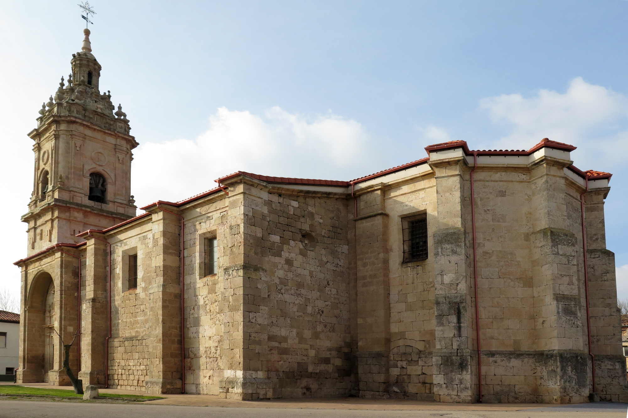 Iglesia de San Millán Abad del pueblo de Cubo de Bureba (Burgos, España)